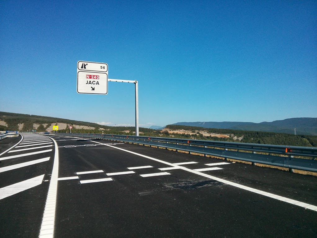 Salida 56 A21 en provincia de Zaragoza